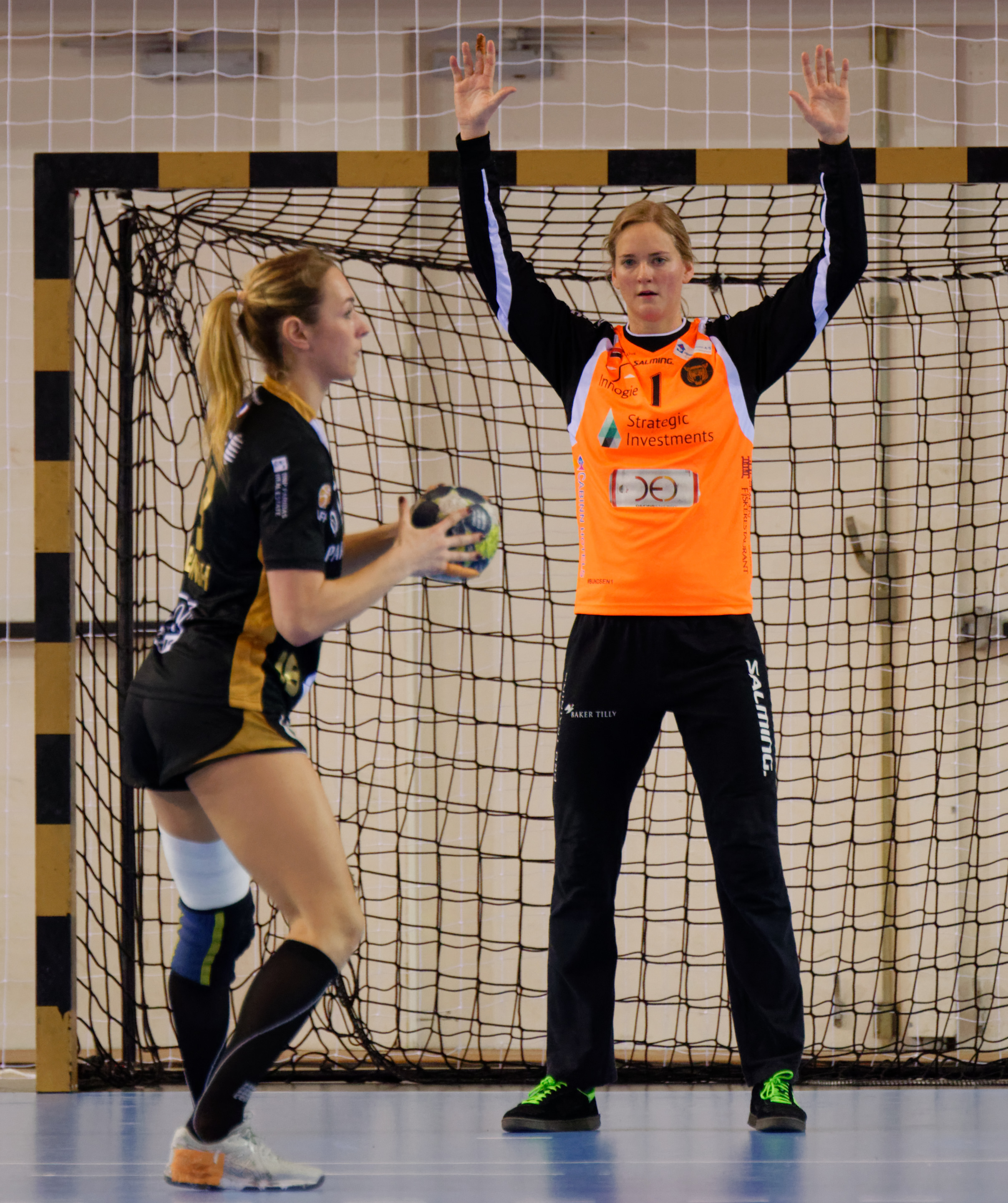 Rencontre du tour principal de la coupe EHF entre Issy Paris Hand et les danoises de Copenhague. A Issy Les Moulineaux, le 28 janvier 2018.